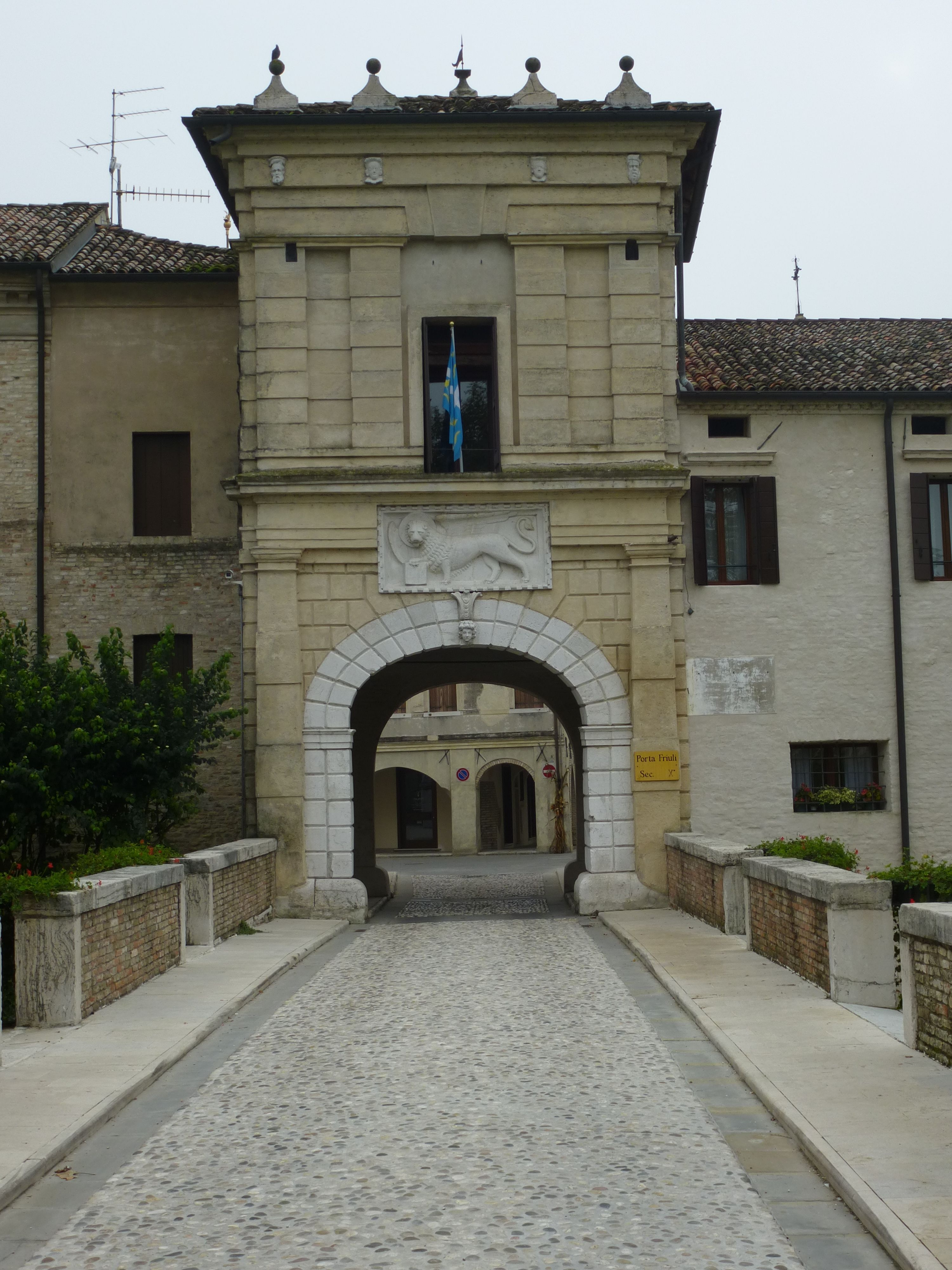 Porta Friuli (10. Jahrhundert)